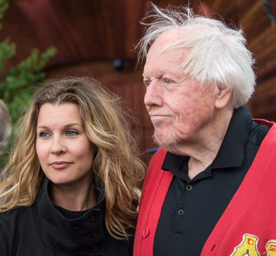 Svante Thuresson och Pernilla Andersson var två av artisterna inför Allsång på Skansen som presenteras den 10 juni 2015 på Skansen i Stockholm.